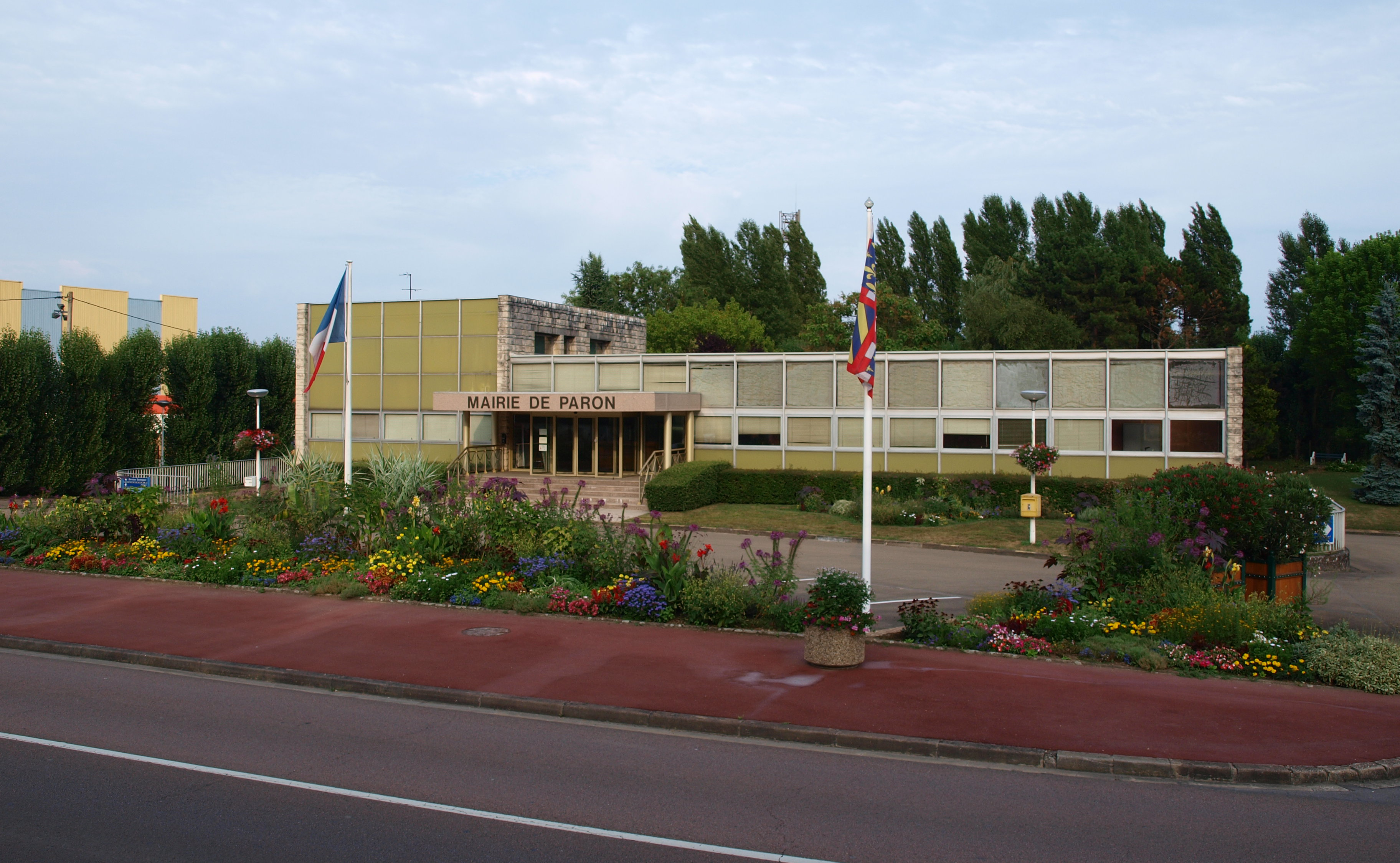 Paron (Yonne, France) ; la mairie